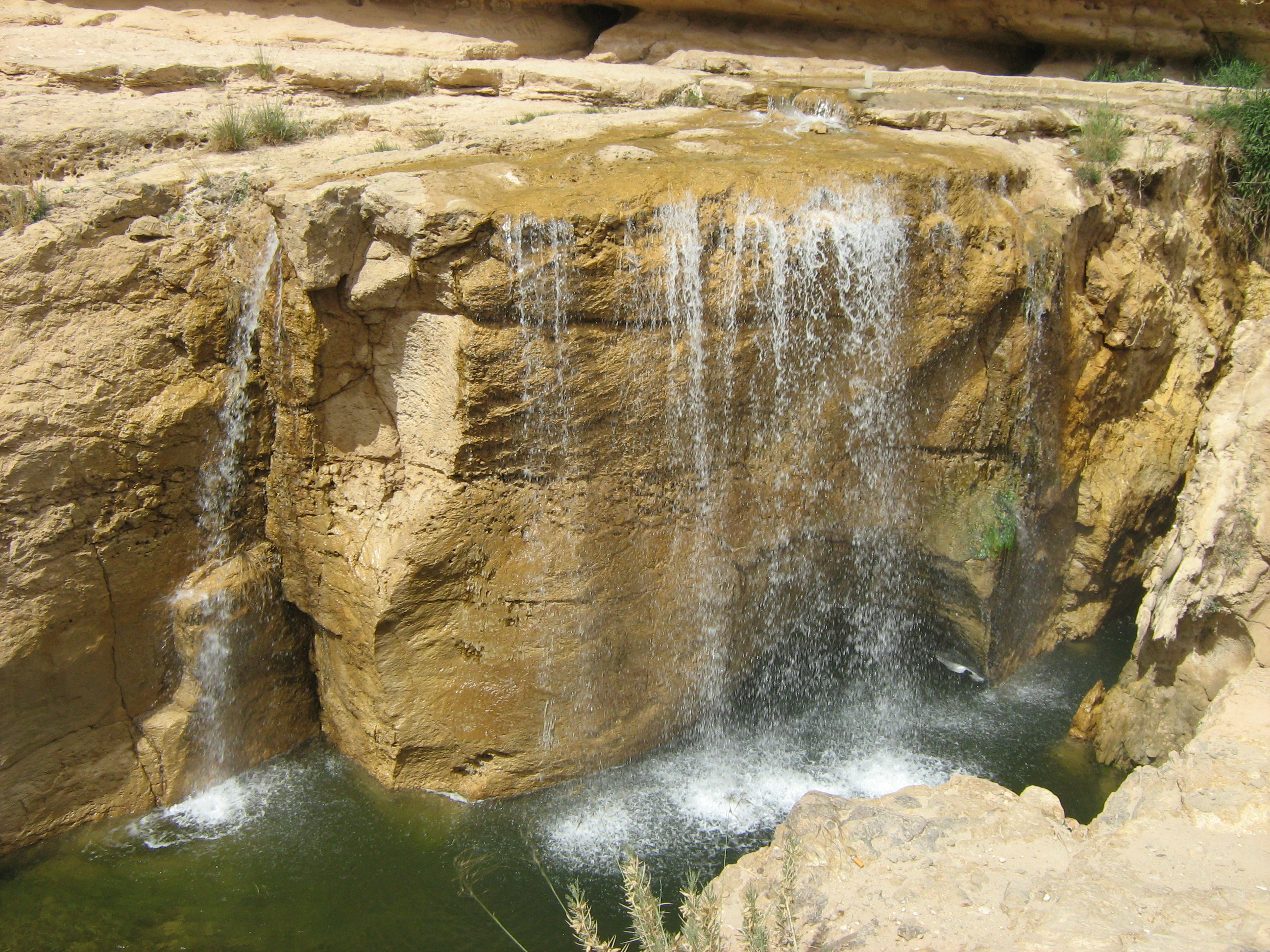 magnifique